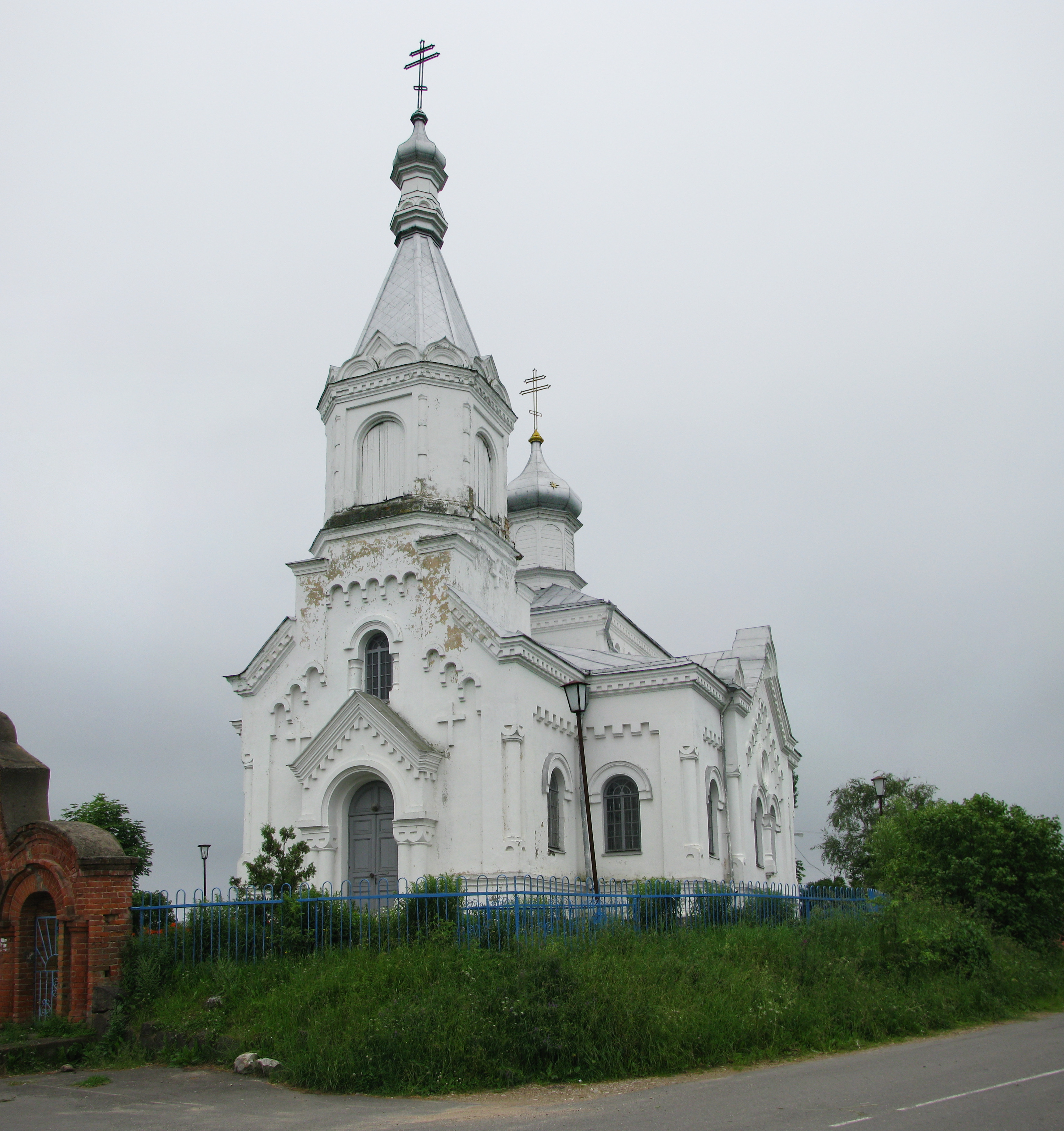 Беларуская (тарашкевіца): Мікалаеўская царква. в. Іказьнь This is a photo of Belarusian heritage monument. Reference number: 213Г000196 ( WLM)